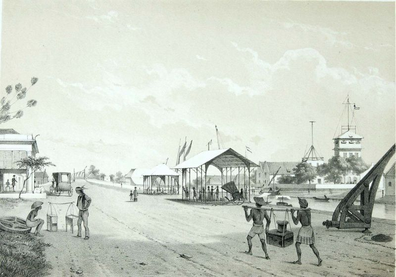 Litho. Litho naar een oorspronkelijke tekening van C. Deeleman. Eerste litho van een boek met 10 litho's naar oorspronkelijke tekeningen van C. Deeleman. Lithograaf: G.J.Bos. Steendruk van P.W.M. Trap, Leiden. Uitgever Gualtherus Kolff, Batavia.. Het Jaagpad, landingsplaats in Batavia